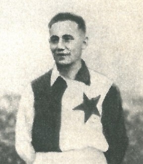 František Hojer - fotbalista